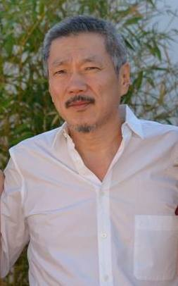 Kim Min-hee, Hong Sang-soo et Isabelle Huppert au festival de Cannes